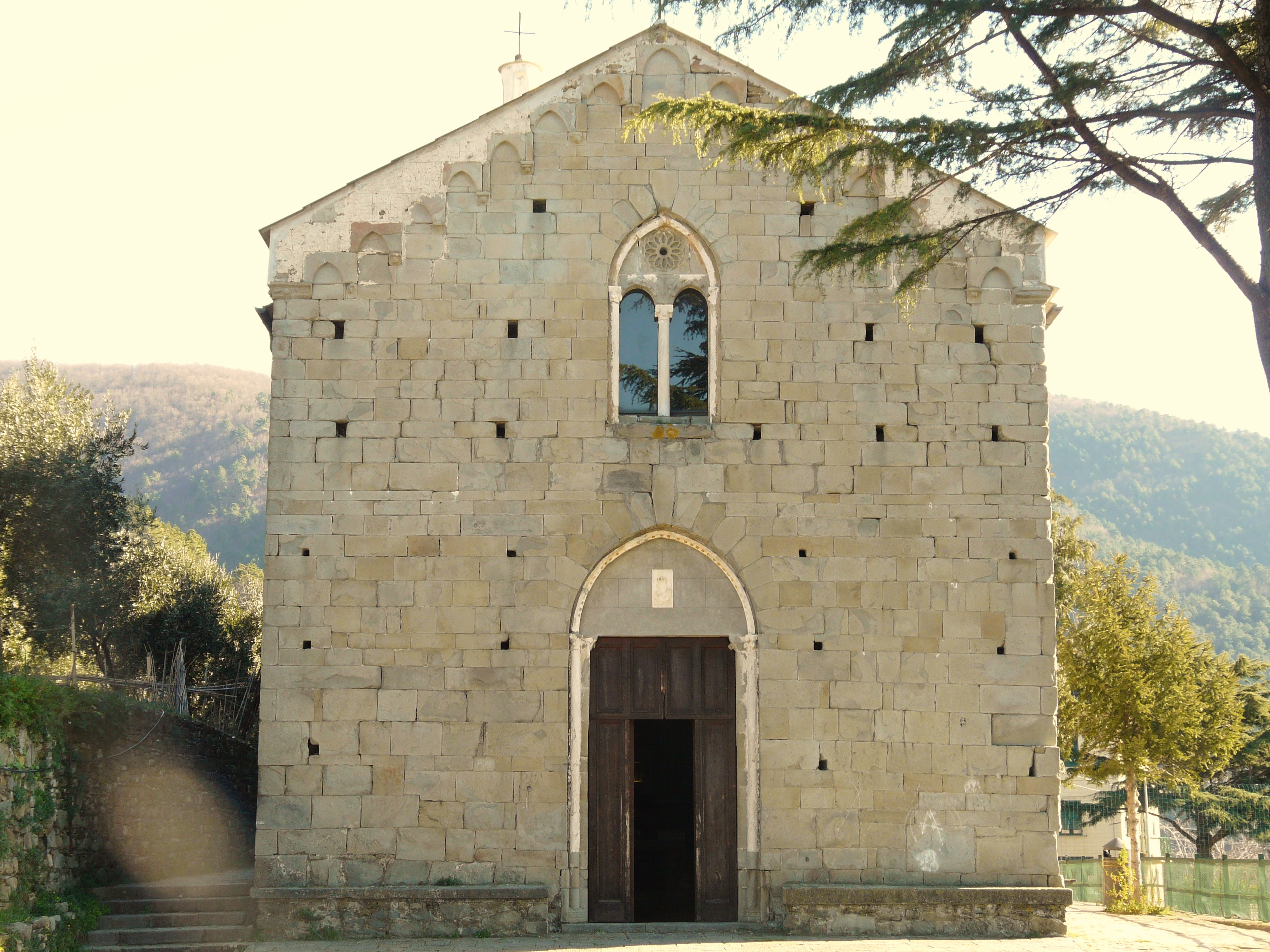 Chiesa di Nostra Signora della Salute, Volastra, Riomaggiore, Cinque Terre, La Spezia, Liguria, Italia